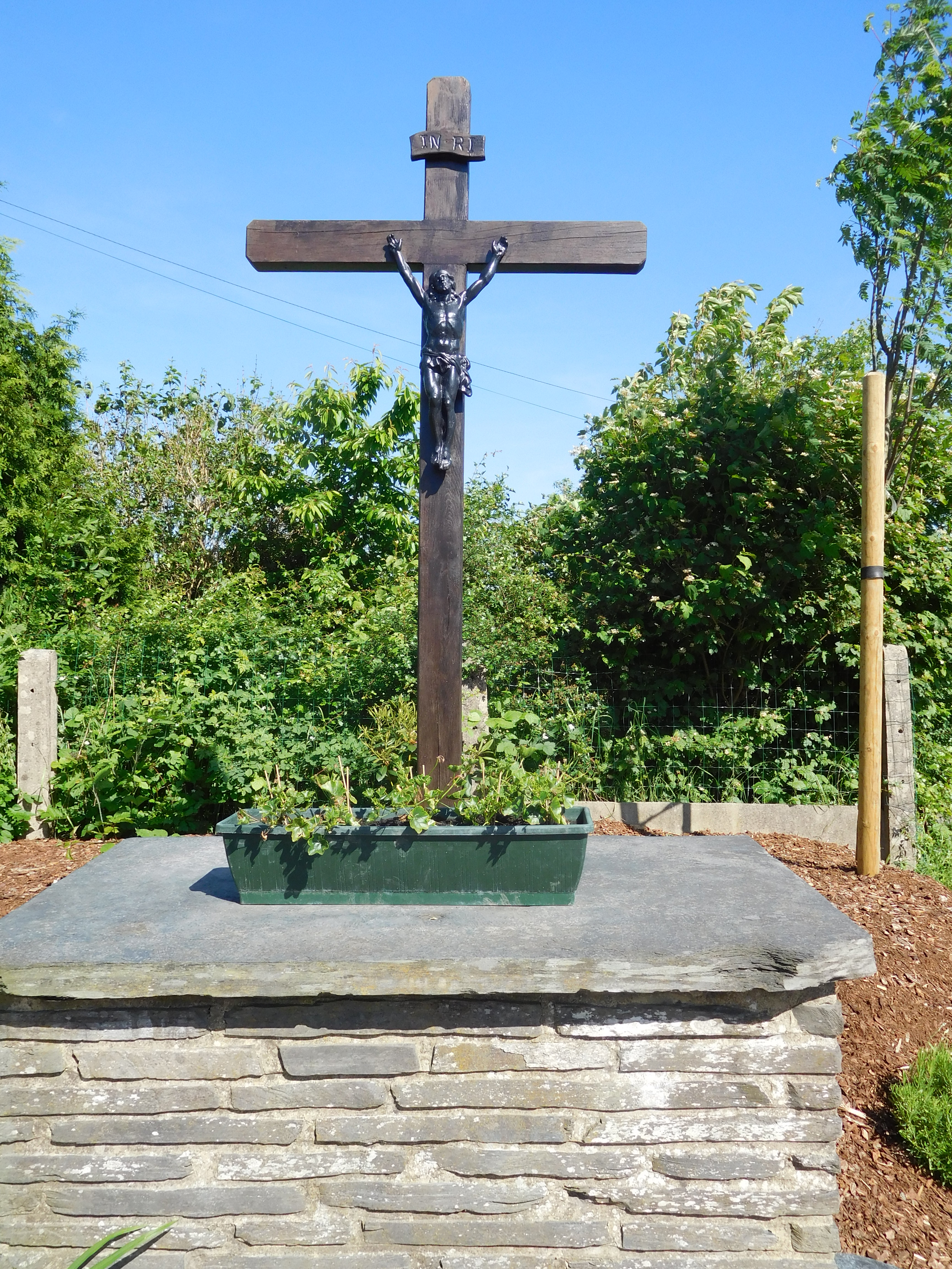 Croix--Crucifix se trouvant dans une rue du village de Saint-Médard, en Belgique